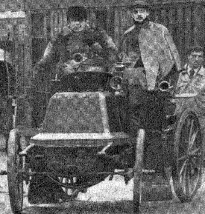 La Vie au Grand Air du 1er avril 1898